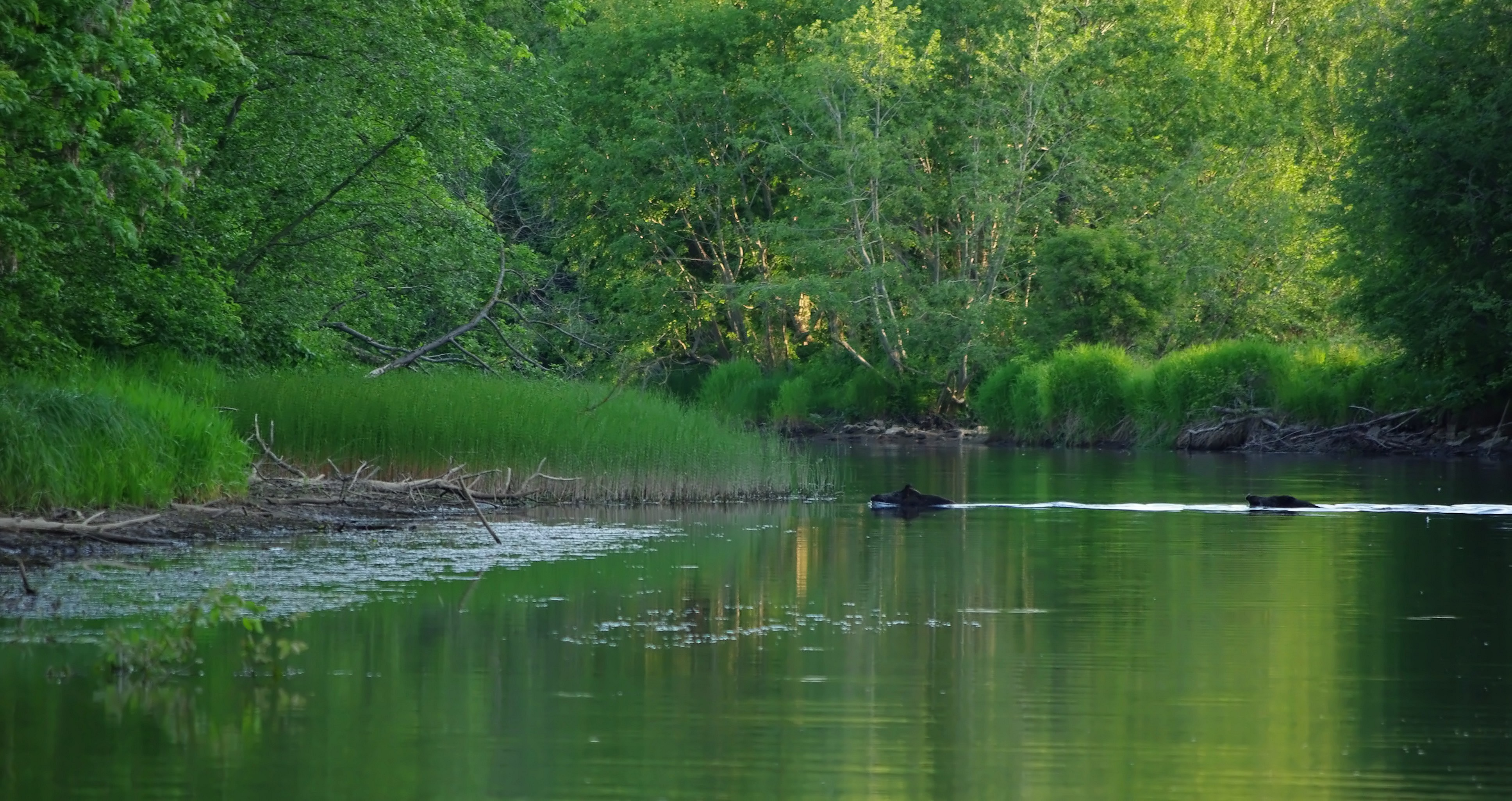 "Suplus Naturas". Varajane hommikutund Kunda jõe alamjooksul. Kohas, kus jõesäng keerab vasakule, ületavad jõge kaks metssiga.